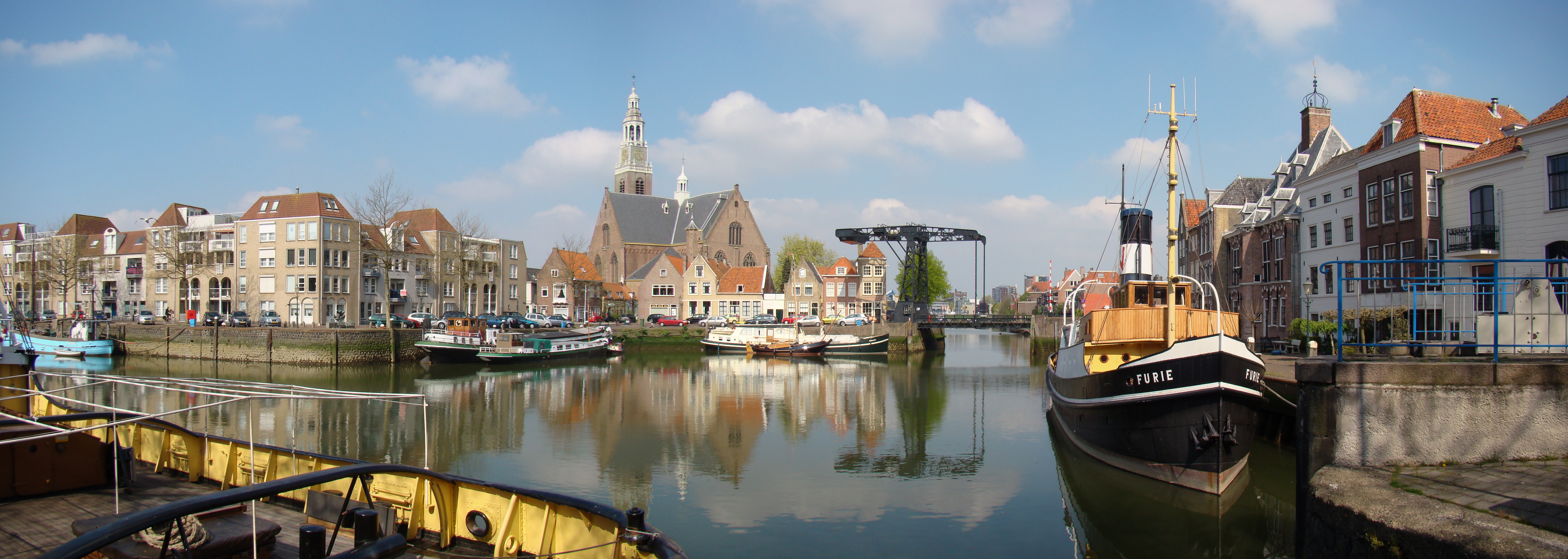 Impressions of Maassluis met sleepboot de Furie en rechts de Wateringsesluis